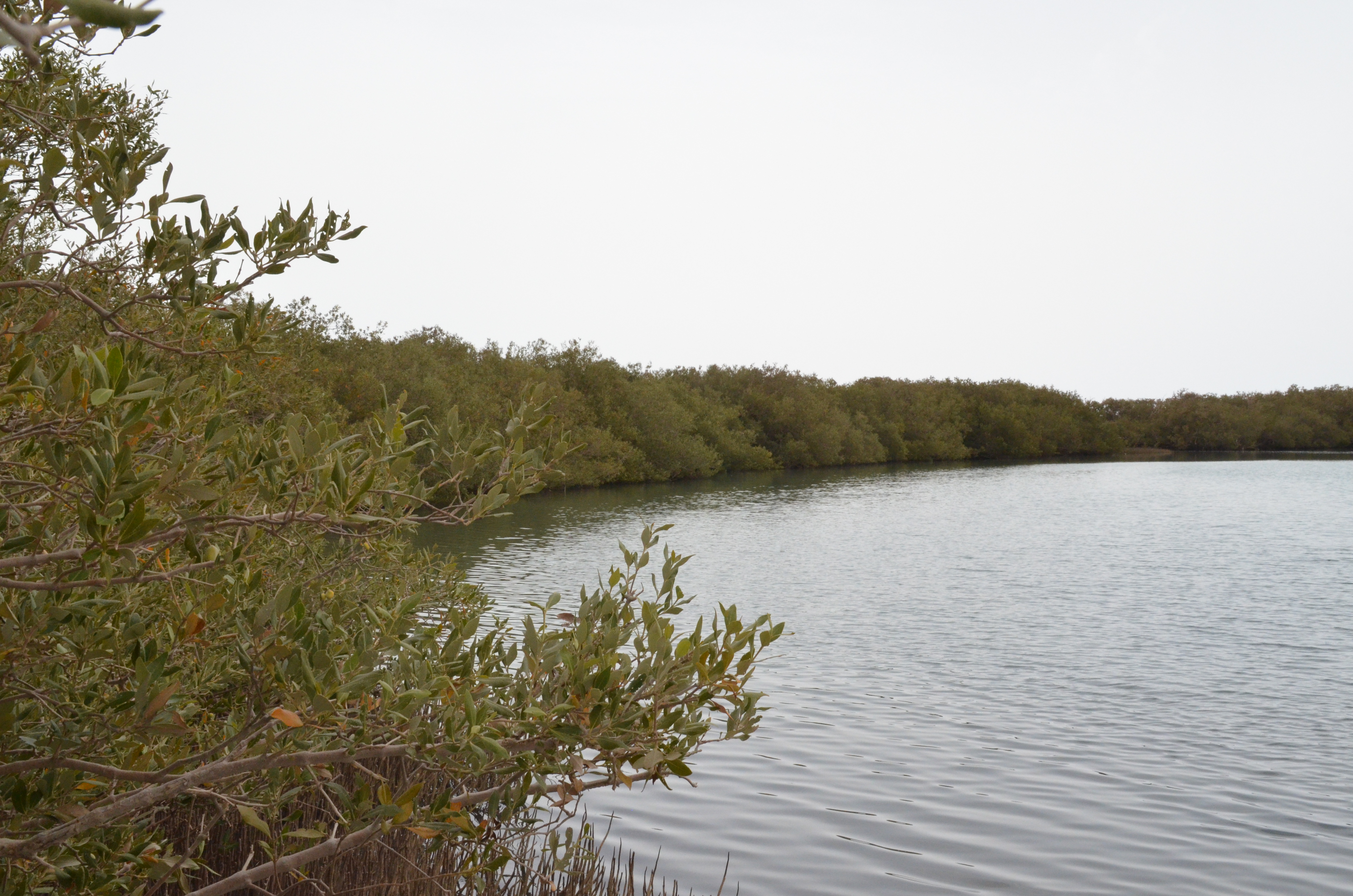 افيسينيا مارينا او ابن سيناء او الشورى او القرم و هو احد انواع المنجروف المتواجد في البحر الاحمر والصورة اخذت في محمية نبق جنوب سيناء